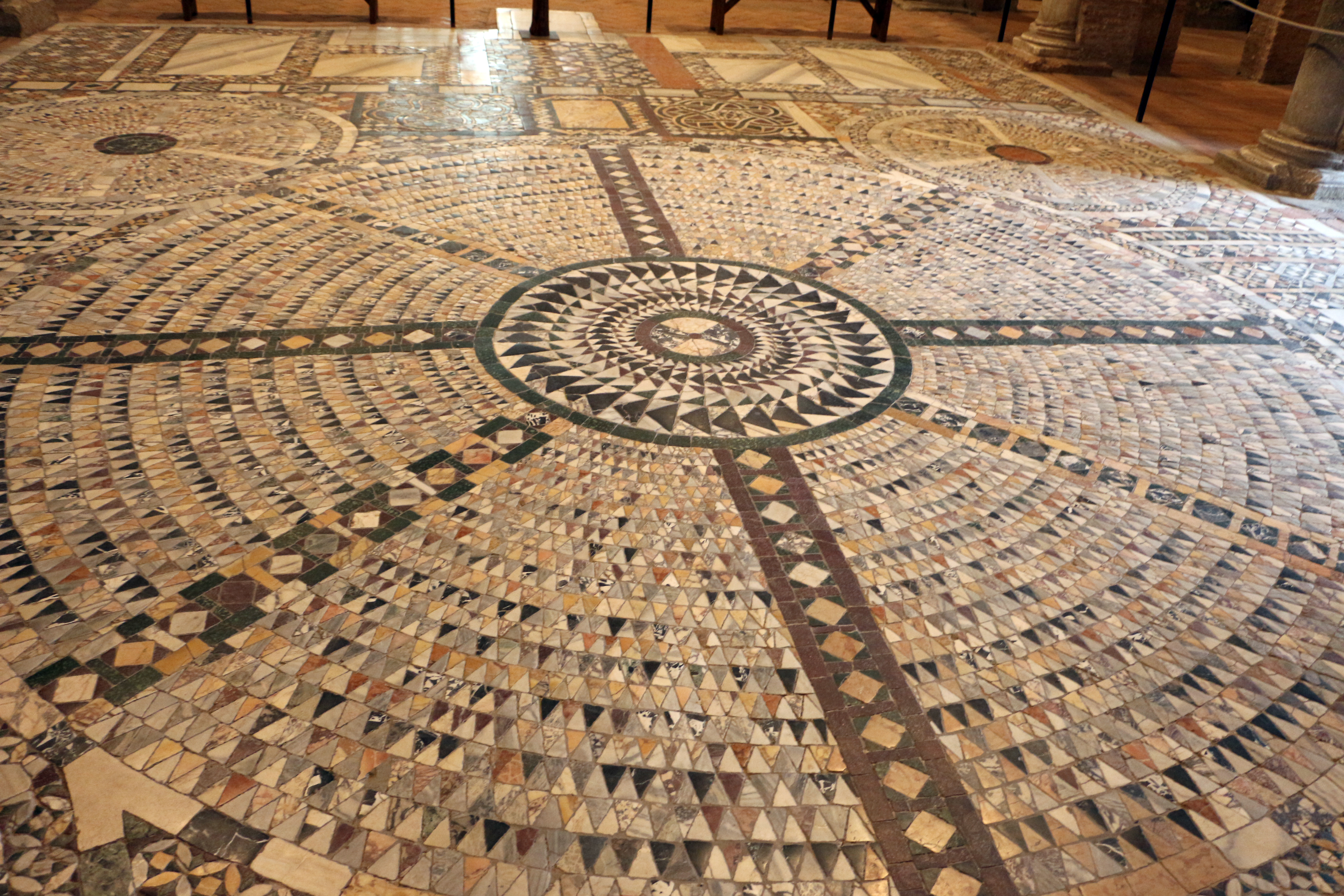 Abbazia di Pomposa This is a photo of a monument which is part of cultural heritage of Italy.